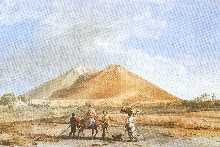 Veduta dei Monti Rossi, Jean-Pierre Houël.